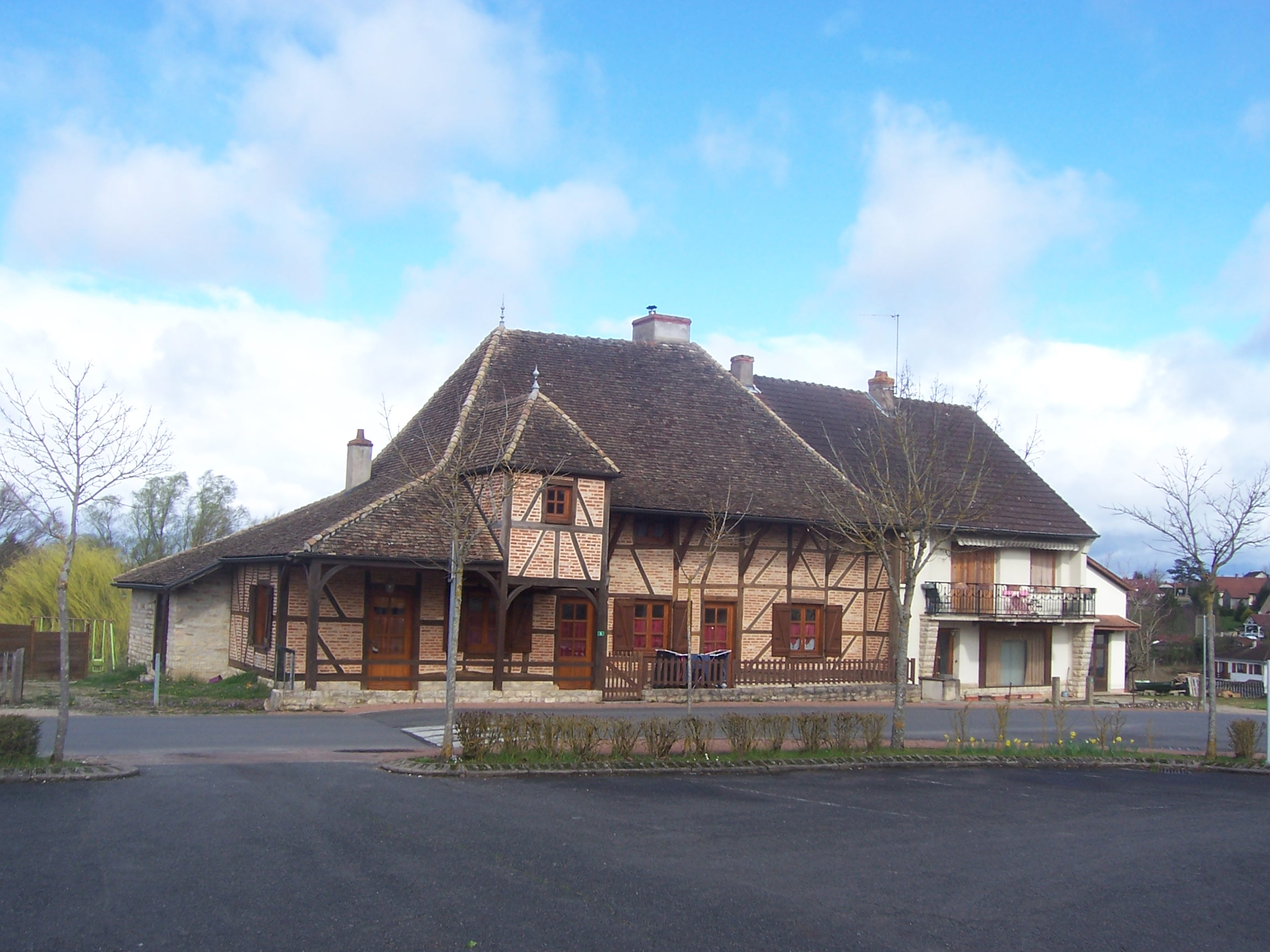 Maison l'Abergement-Sainte-Colombe